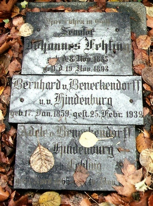 Hindeburg’sches Urnengrab